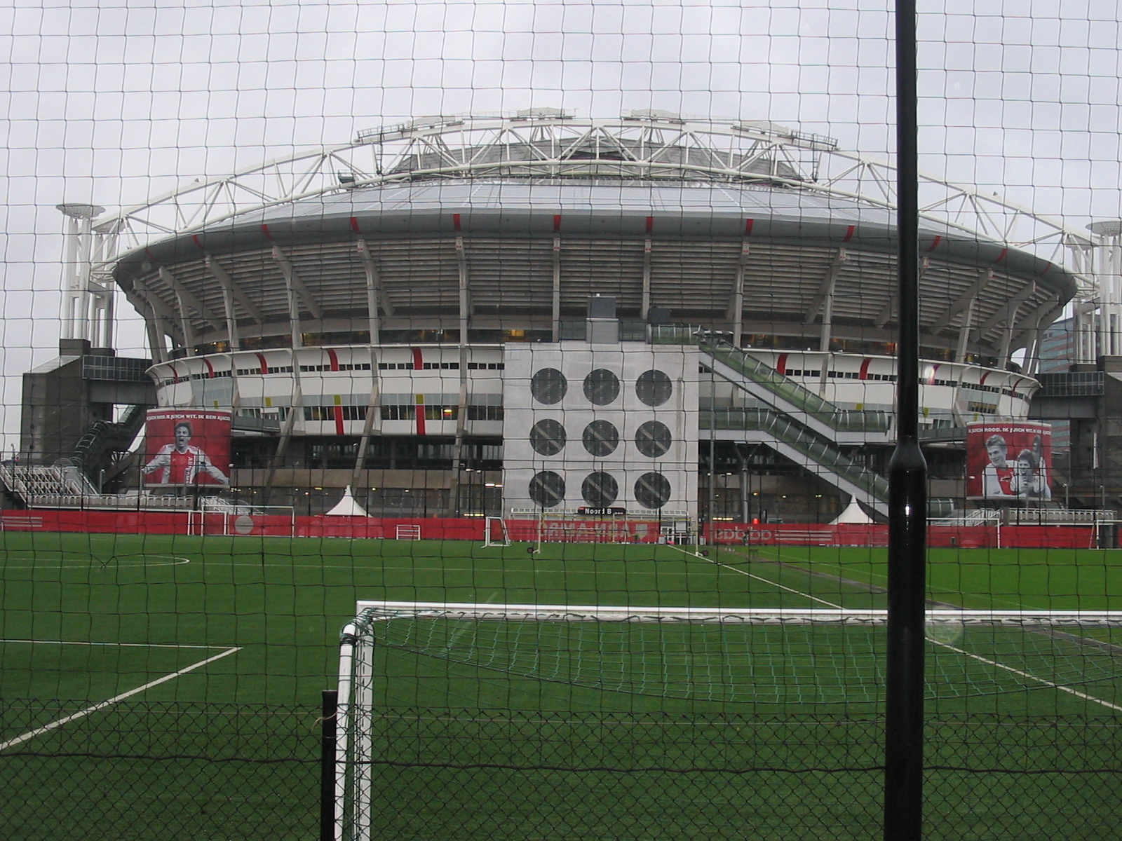 De Arena vanaf het trainingsveld gezien. Links is kunstgras rechts is echt gras. Vanaf hier kijk je naar de noordkant van het stadion.